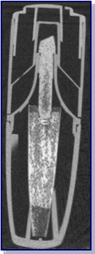 Sezione tomografica di un evidenziatore